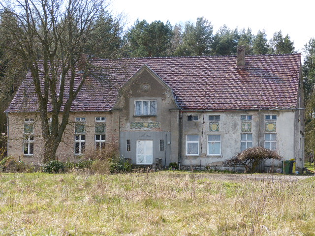 Ehemaliges Gutshaus Niemierze (Nehmer)